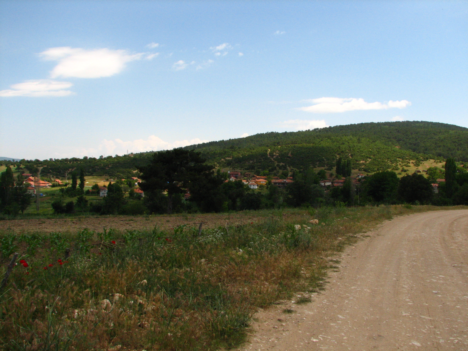 fotoğraf Diğer bilgiler take foto by rahmi